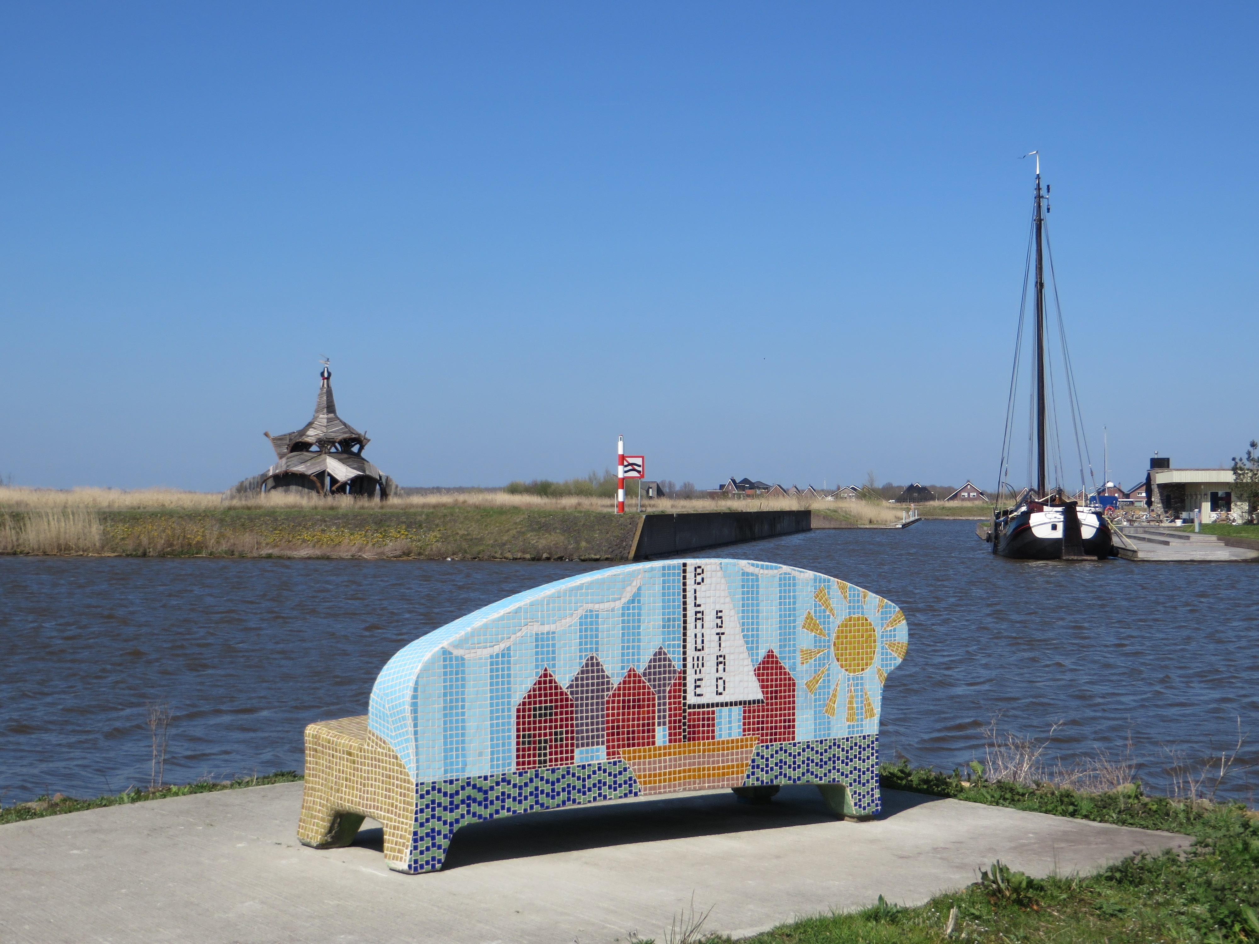 Social sofa's in Blauwe Stad